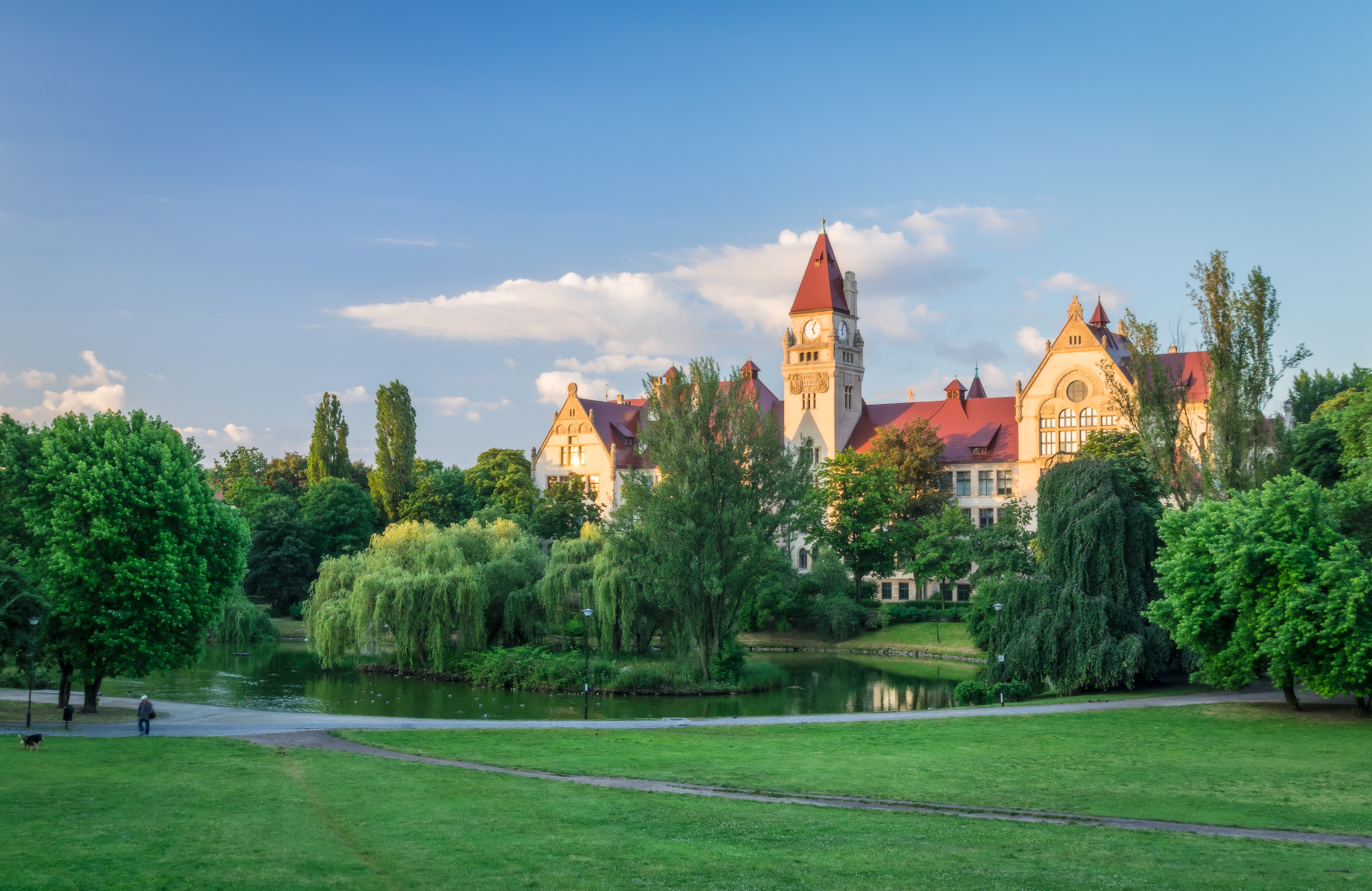 Wrocław, budynek politechniki ("Staadtbauschule"), 1901-1903